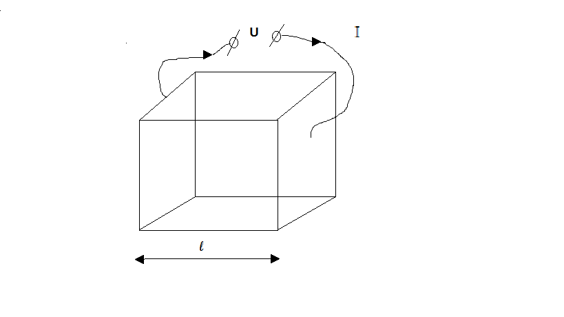 Օհմի օրենքը